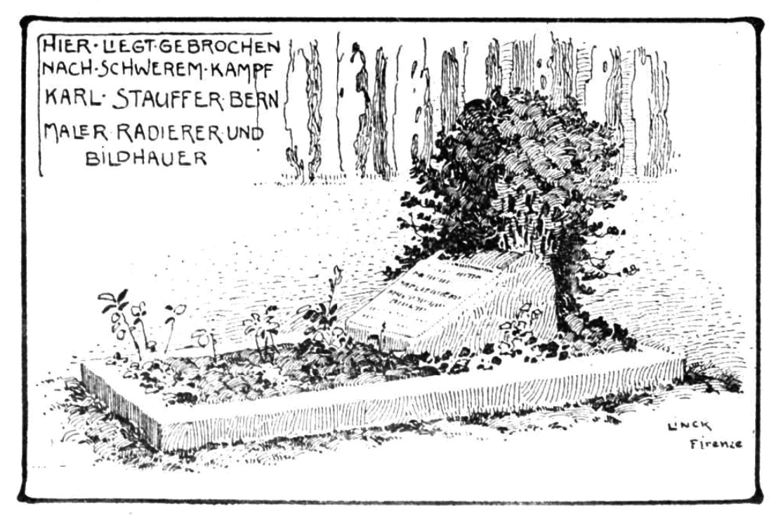 Grab von Karl Stauffer (1857–1891) auf dem protestantischen Friedhof Cimitero Evangelico agli Allori bei Florenz. Gezeichnet von Ernst Linck, Bern